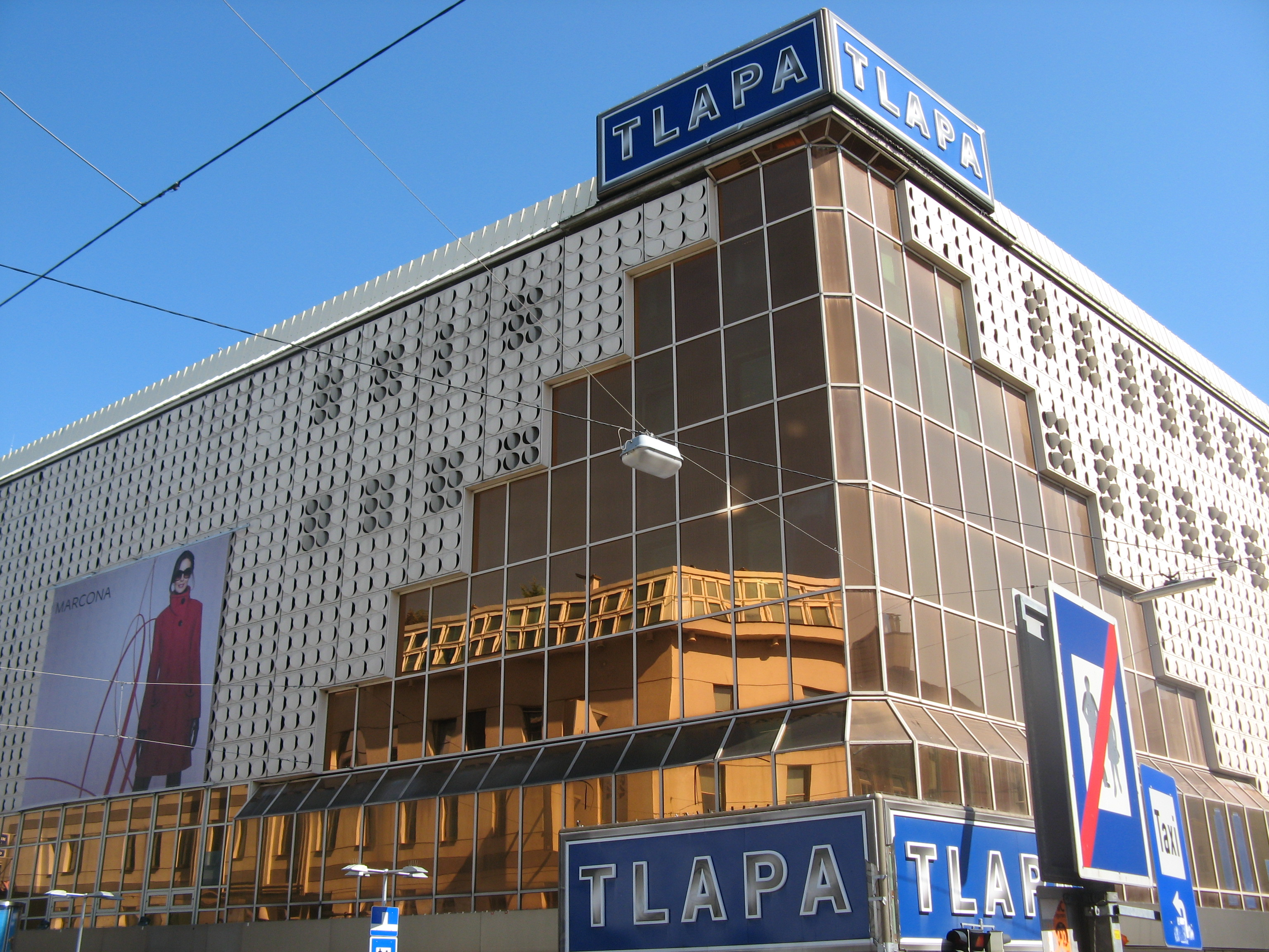 Modehaus Tlapa, Favoritenstraße 73-75, Wien-Favoriten